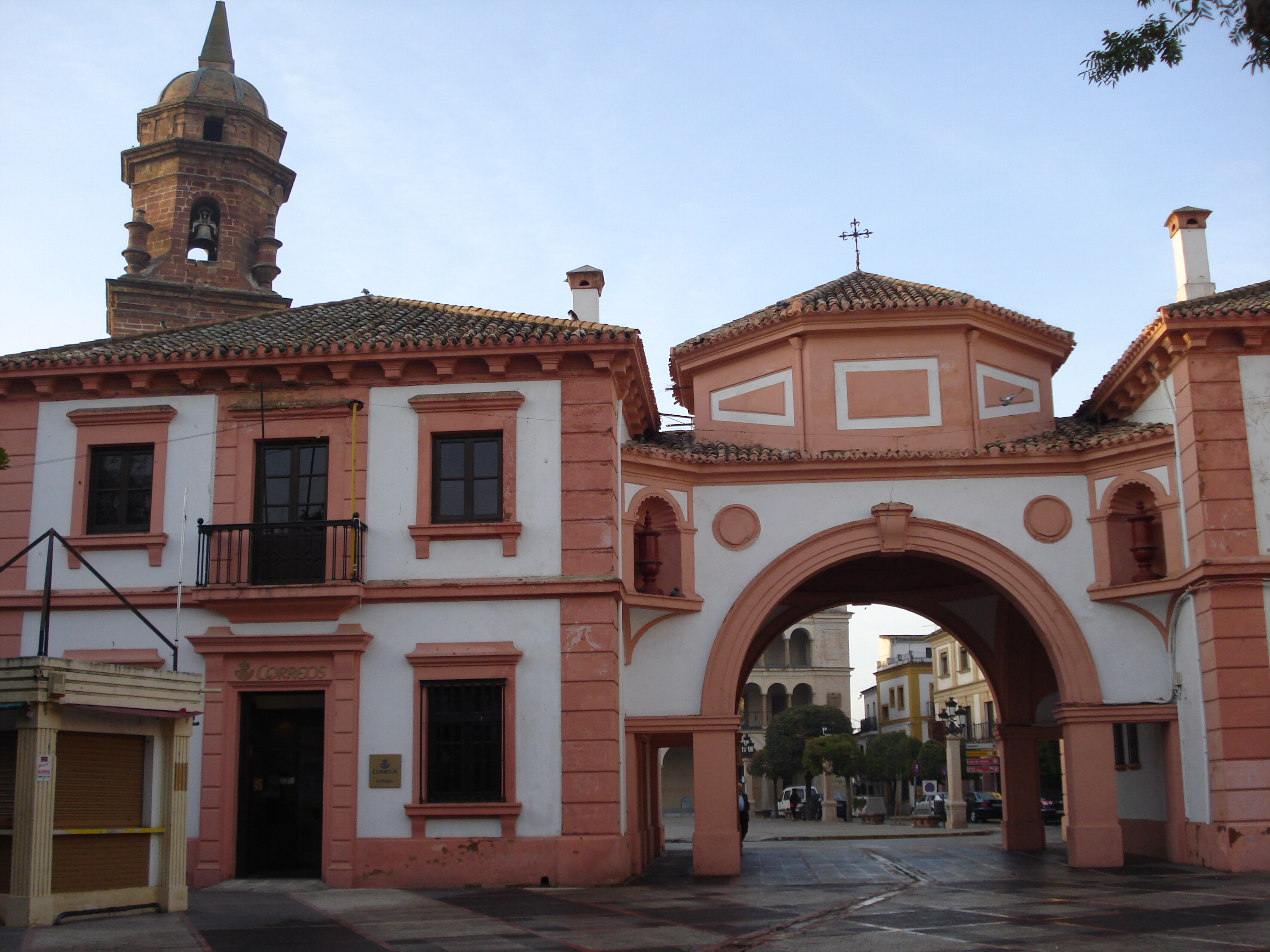 Antigua sede de Correos y Telégrafos de Andújar, Andalucía.